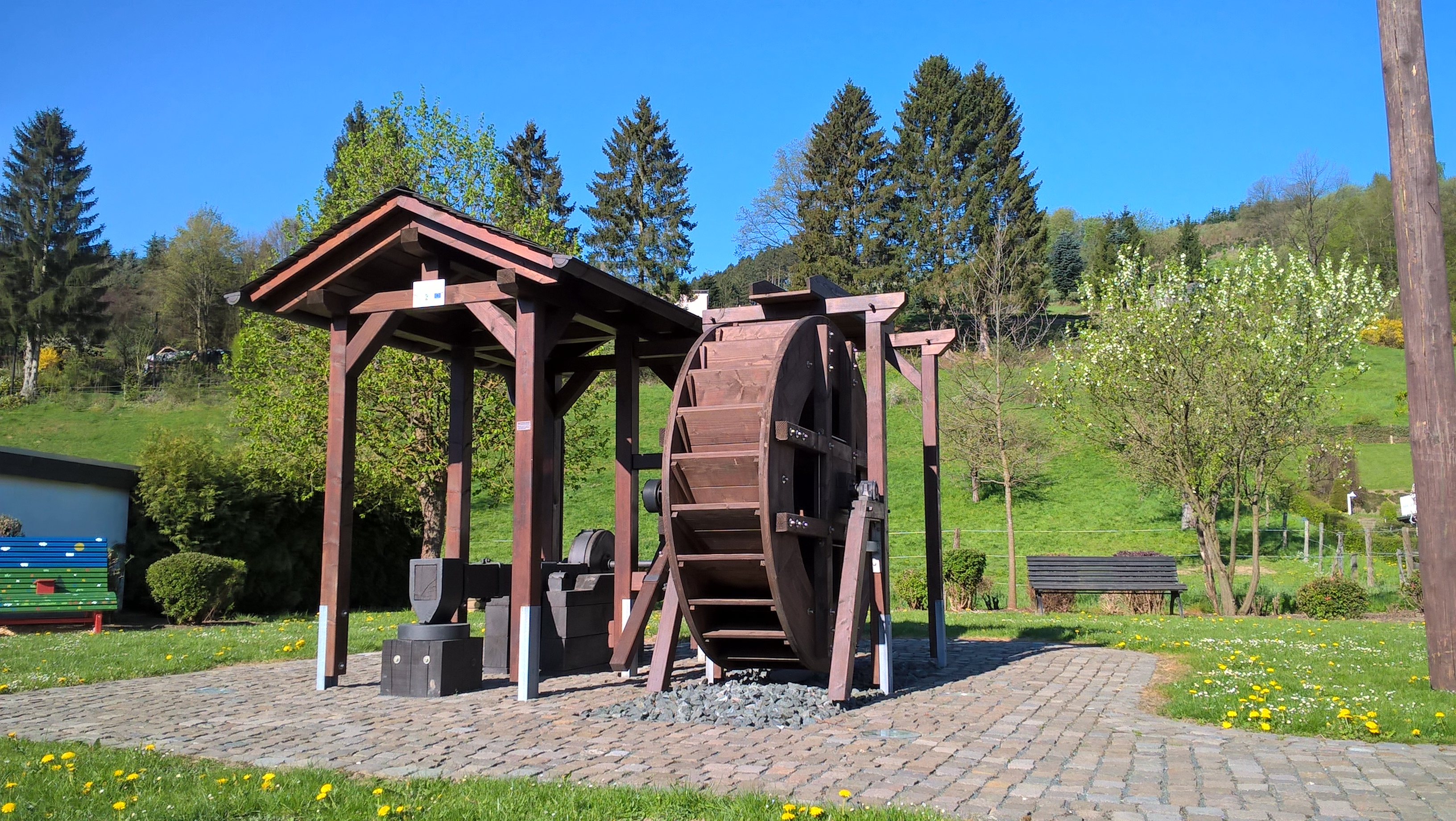 Nachbildung des Heringhauser Eisenhammers in der Dorfmitte